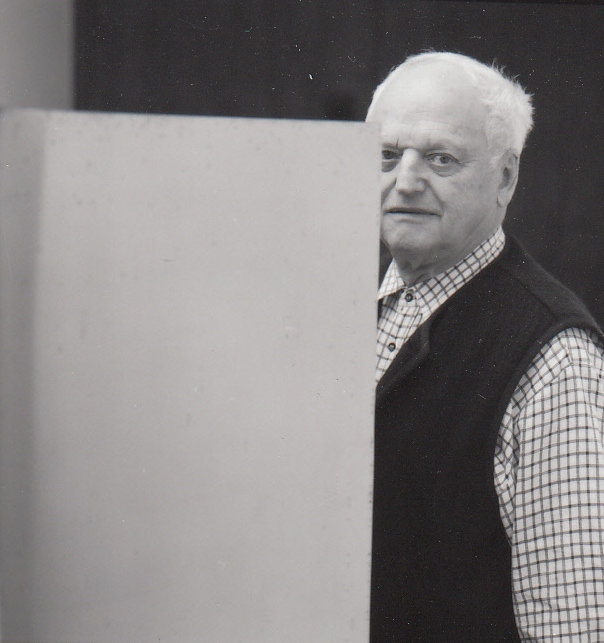 Porträt Georg Malin